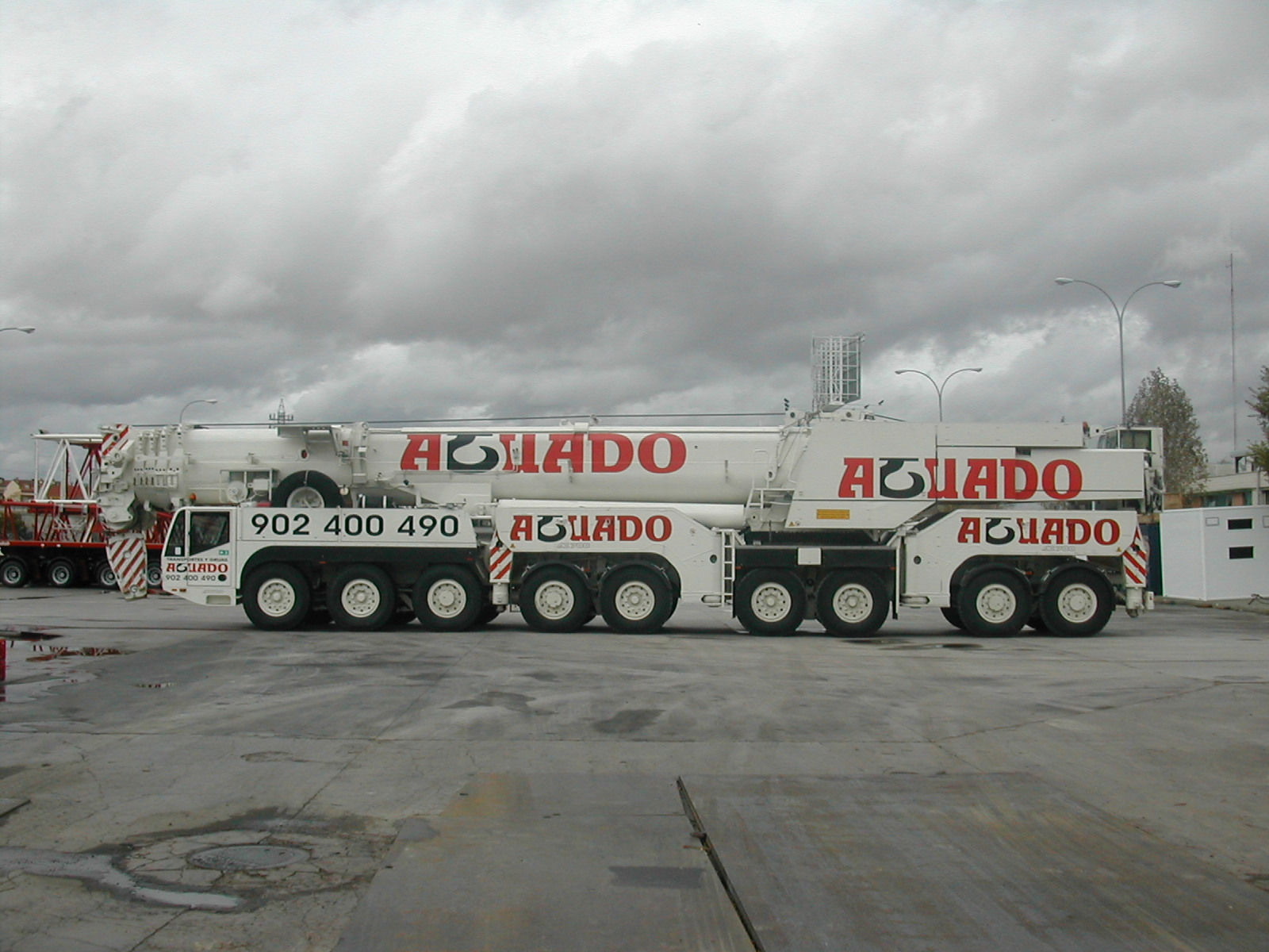 grua telescopica autopropulsada sobre camión de 700tn